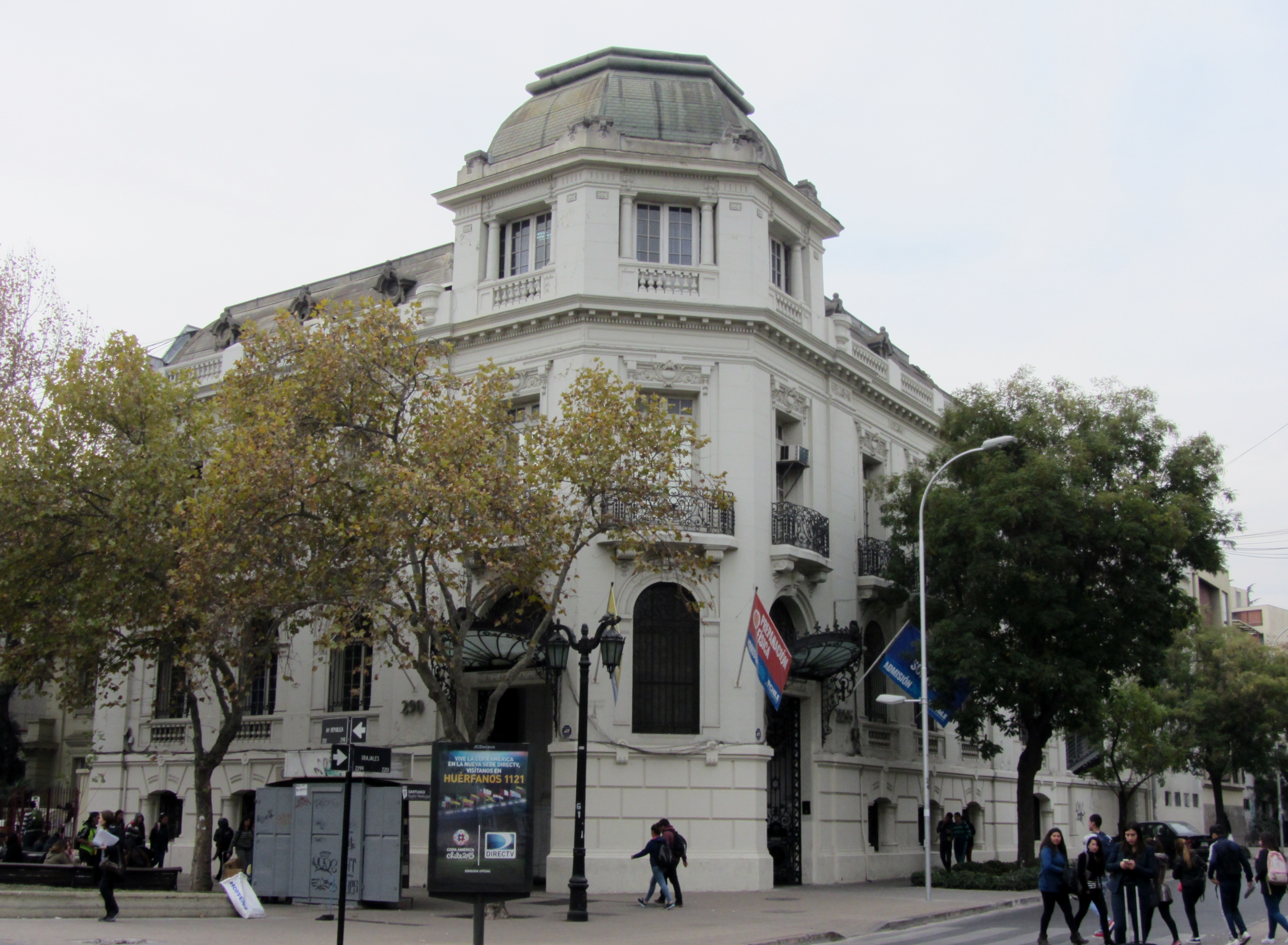 Palacio Herquíñigo ubicado en la esquina nororiente de avenida República con la calle Grajales, en Santiago de Chile. Alejandro Herquíñigo Gómez (1879) encargó en 1919 el diseño de esta mansión al arquitecto Ricardo Larraín Bravo. Actualmente pertenece al Instituto Profesional de Chile; antes fue ocupado por la embajada de México y, por un largo period, por la Droguería Michelson